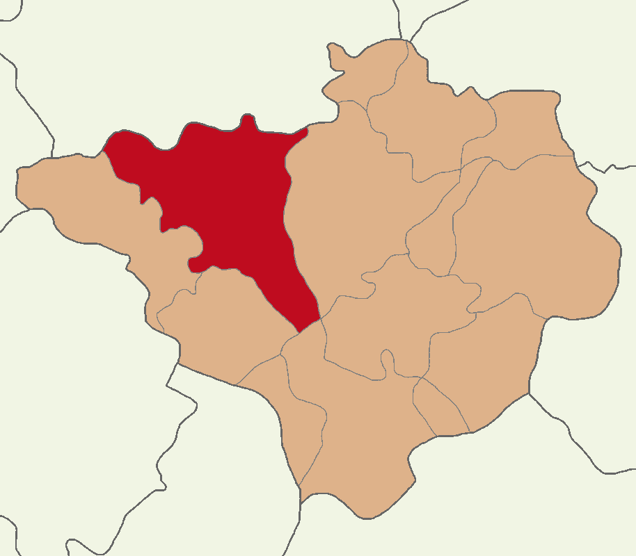 Lea faka-Tonga: Yozgat Merkez ilçesinin konumu